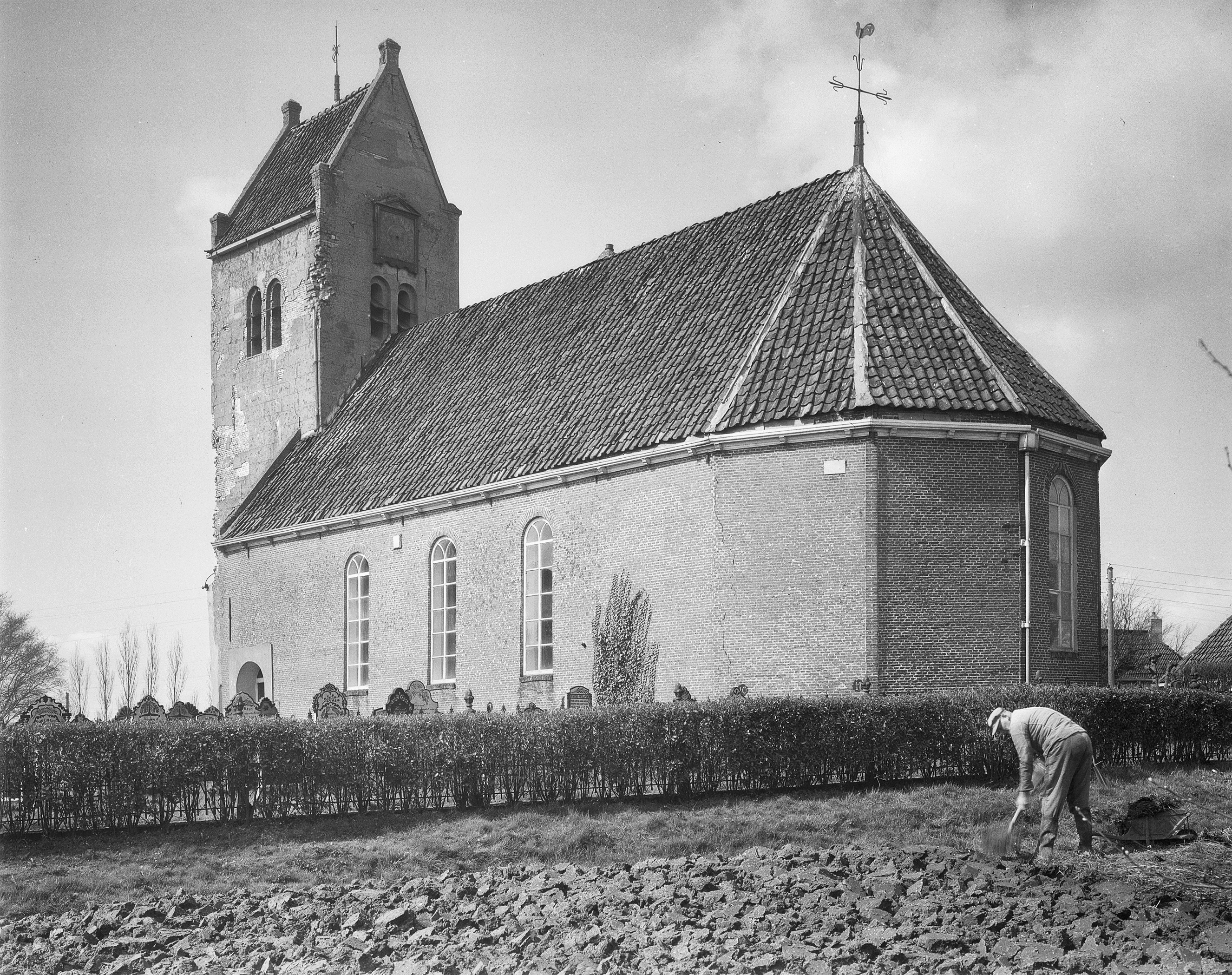 Nederlands Hervormde Kerk: exterieur naar het westen